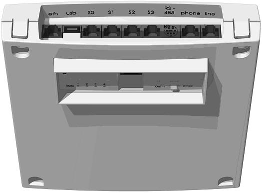 Plaatje van HCB